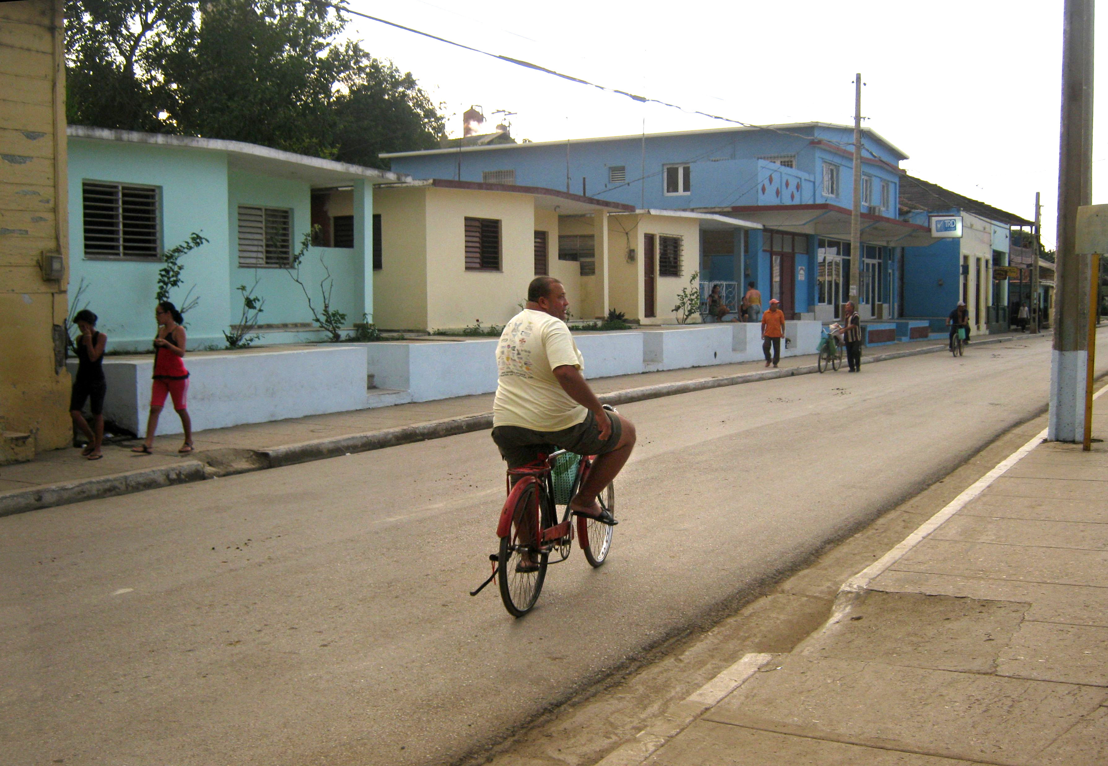 Calle Céspedes, Niquero